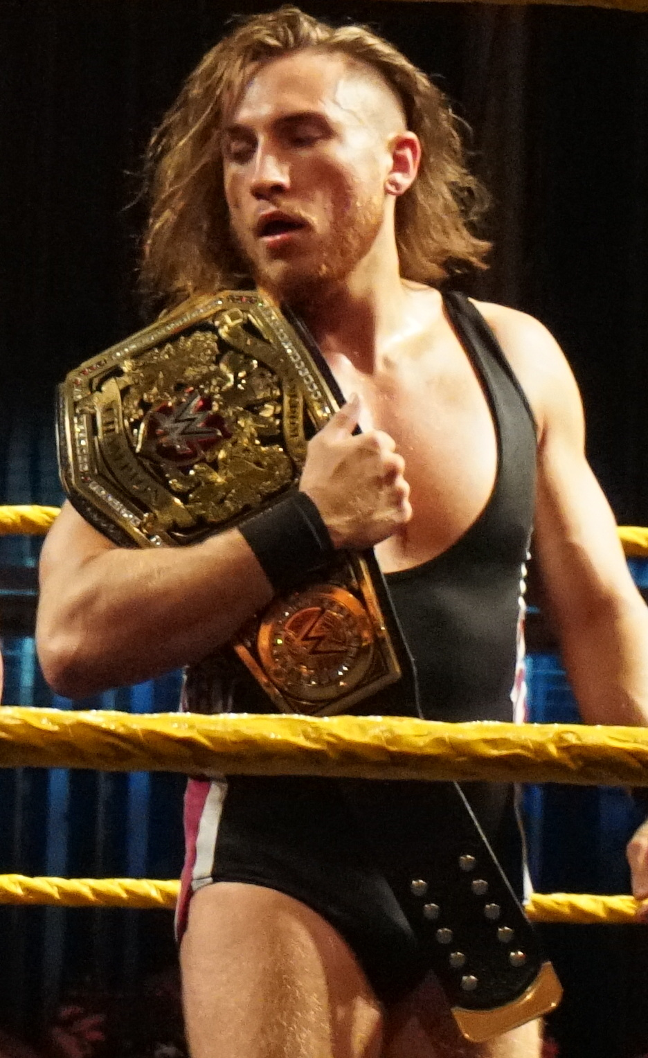 WWE Live 2018 - Antwerpen (NxT) - Aleister Black & Johnny Gargano & Pete Dunne Vs Lars Sullivan & The Velveteen Dream & Tommaso Ciampa Aleister Black & Johnny Gargano & Pete Dunne def. (Pin) Lars Sullivan & The Velveteen Dream & Tommaso Ciampa Type of match : 6-person tag ( Bonne nouvelle pour les inconditionnels du catch en Belgique : le mardi 12 juin 2018, les superstars de NXT donneront le meilleur d'eux-memes au Stadsschouwburg Antwerpen, lors d'un show exclusif au Benelux. WWE NXT est une emission televisee creee en 2010, durant laquelle de jeunes catcheurs sont formes par des veterans comme Chris Jericho et C.M. Punk. Tous partagent le meme reve : devenir la nouvelle star du catch. Le programme WWE NXT a tres vite rencontre un enorme succes. Aujourd'hui, WWE NXT est connu comme une veritable machine a talents. Pensez par exemple a Seth Rollins, qui etait encore chez nous pas plus tard que l'annee derniere pour WWE Live. Cette annee encore, vous aurez la chance de voir a l'oeuvre de nombreux nouveaux talents du catch ! A l'affiche, on trouve notamment Aleister Black, Adam Cole, Undisputed Era, Velveteen Dream, Ricochet, Nikki Cross, Shayna Baszler et Kairi Sane. Le line-up reste sujet a des changements de derniere minute. Attendez-vous a un show sensationnel et plein de tension ! )